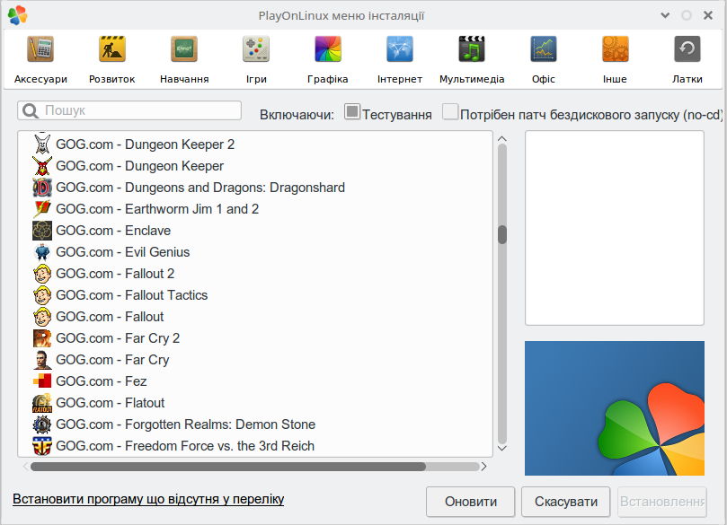 Скріншот PlayOnLinux з іграми GoG